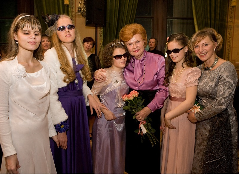 Festivāla Nāc līdzās! patronese Vaira Vīķe-Freiberga un veidotāja Sarma Freiberga pēc koncerta kopā ar festivāla dalībniecēm.